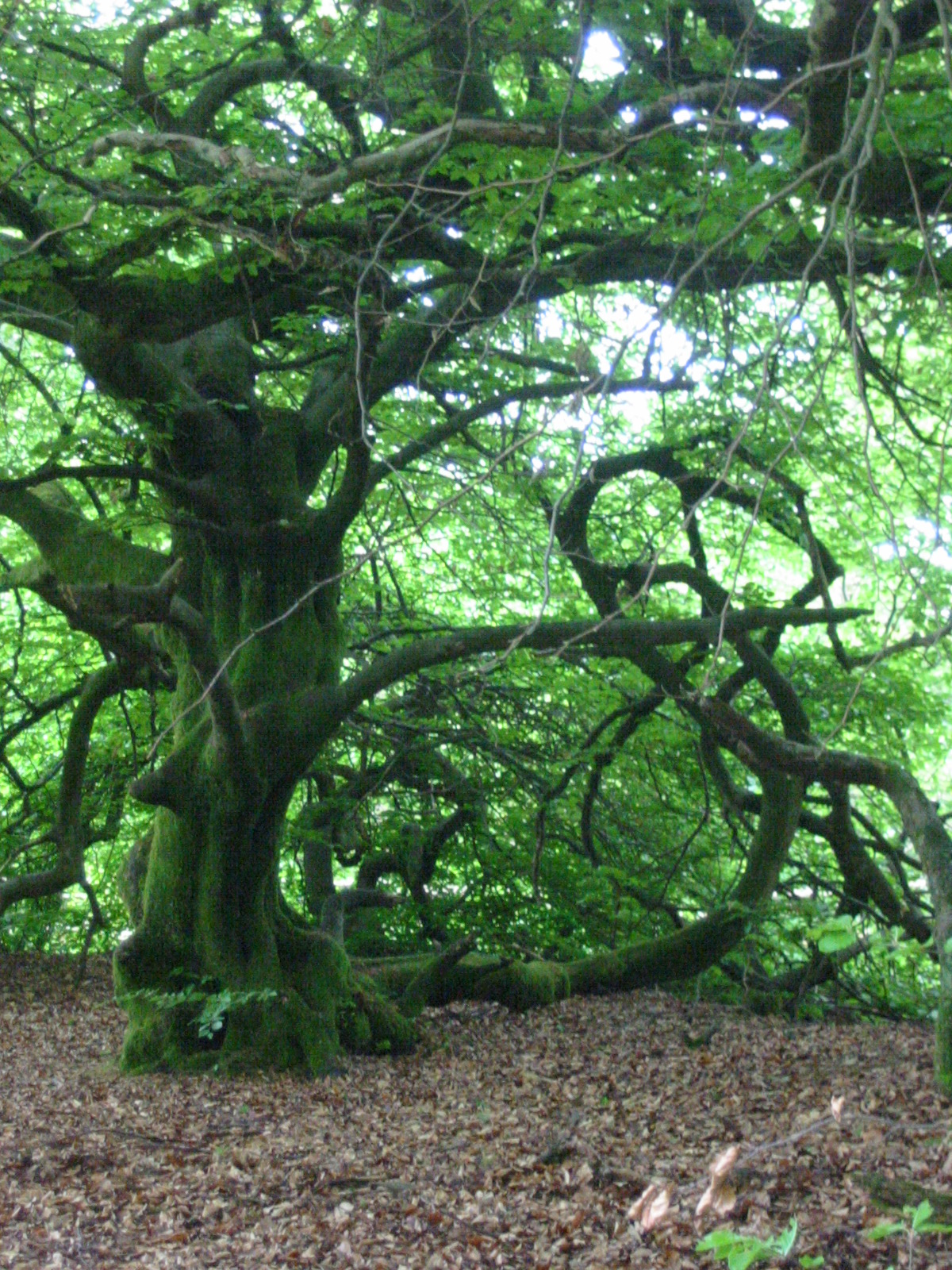 Parc naturel régional de la Montagne de Reims.